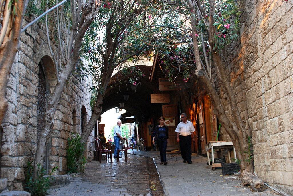 byblos, lebanon.